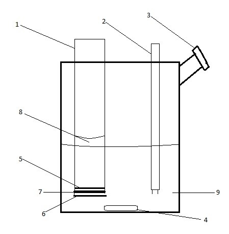 Karl Fischeri kulonomeetrilise titraatori mõõterakk diafragmaga generaatorelektroodiga. – generaatorelektrood, – indikaatorelektrood, – septum otsesisestusteks, – magnetsegaja pulk, – generaatorelektroodi katood – generaatorelektroodi anood – diafragma, – katolüüdi lahus, – anolüüdi lahus.